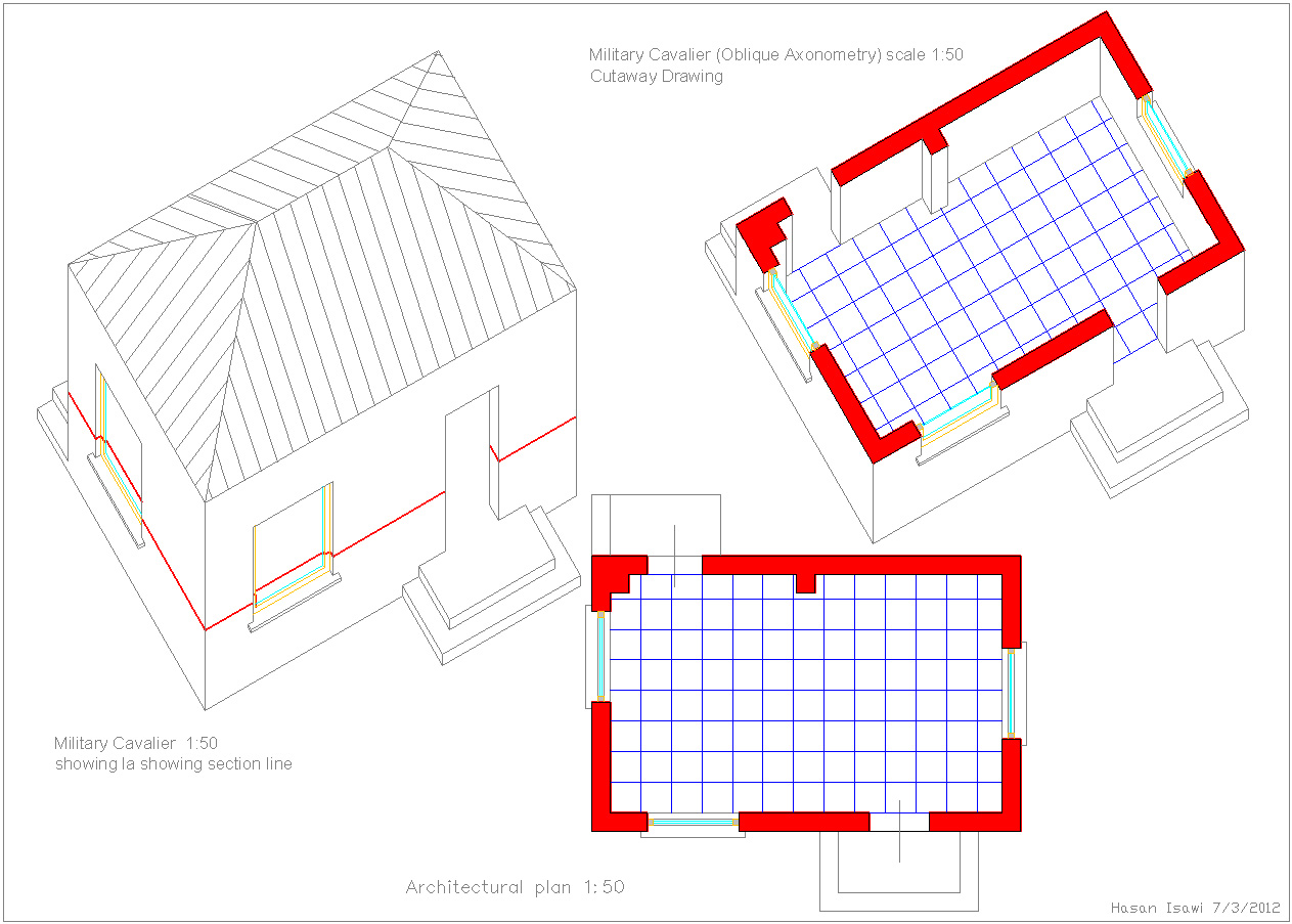 la pianta come sezione di un edificio e la sua proiezione ortogonale (insieme a tutto gli elementi sottostanti essa) su un piano oizzontale, normalmanete coincidente con il pavimento del piano sezionato.